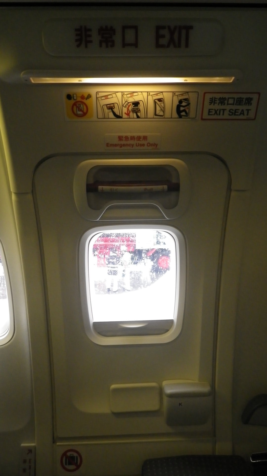 ボーイング737の主翼上のタイプIII非常口。